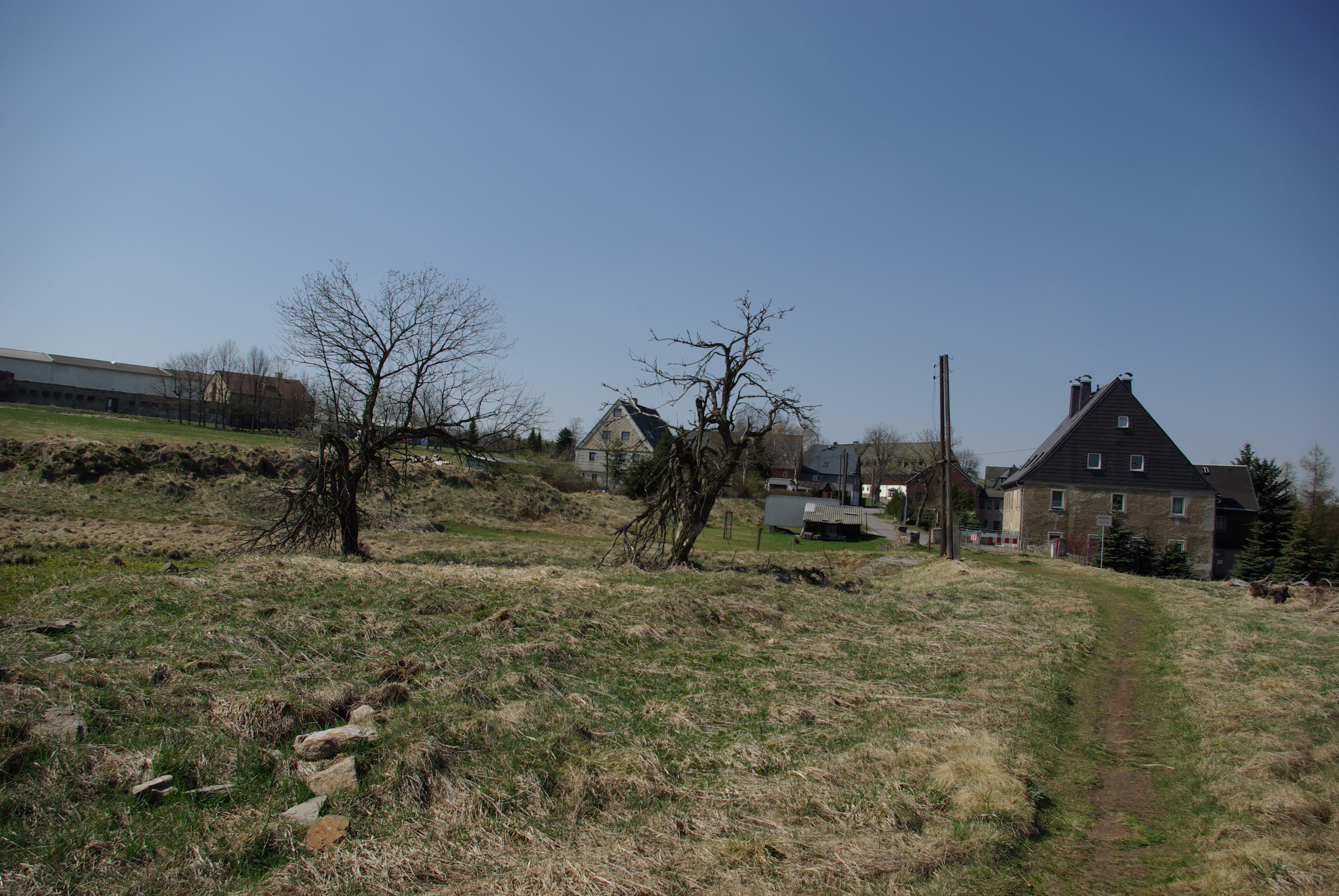 Czech Republic–Germany border Satzung–Jilmová (Ulmbach)